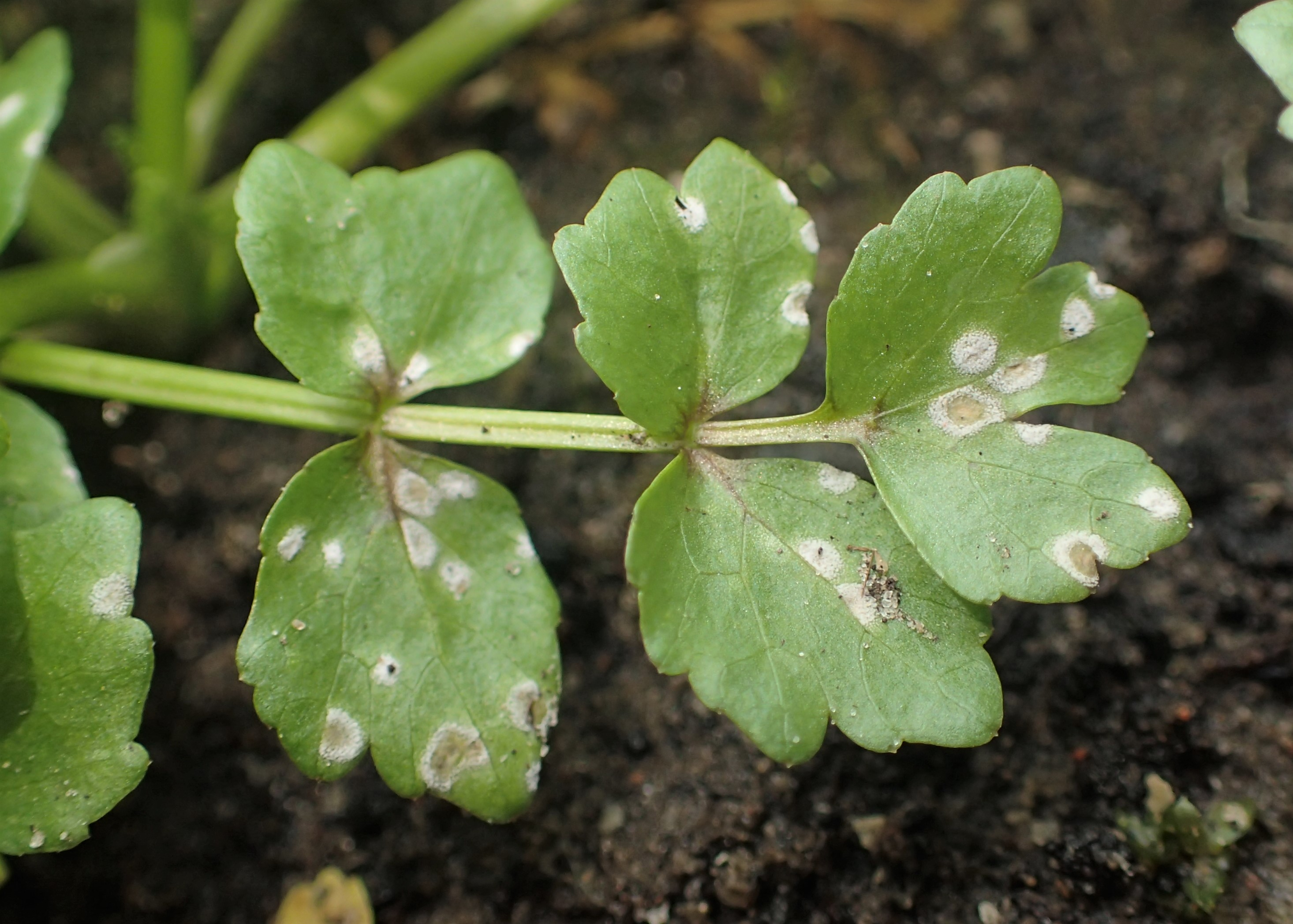 Entyloma helosciadii on Helosciadium repens (plants cultivated in Szczecin, NW Poland)